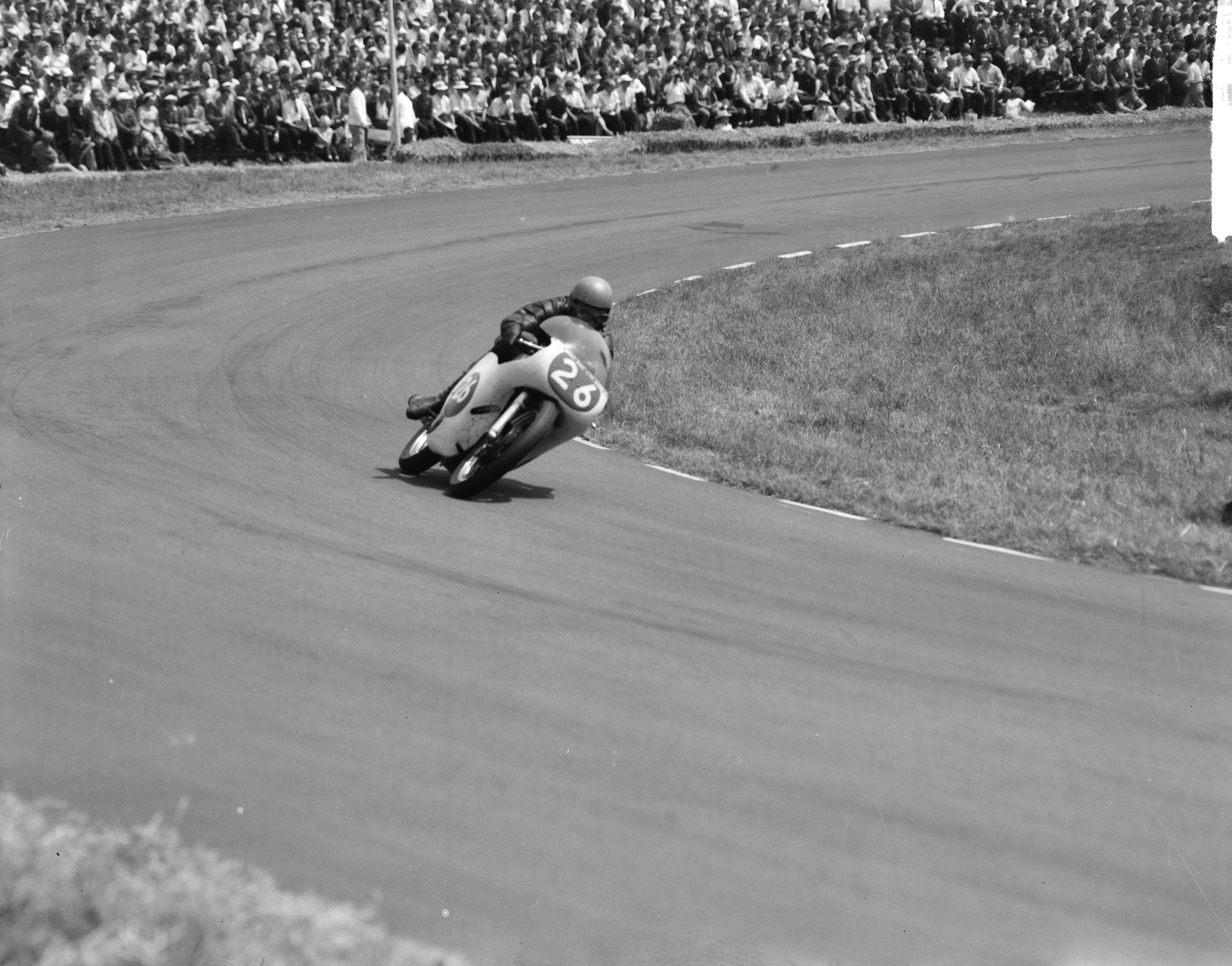 Collectie / Archief : Fotocollectie Anefo Reportage / Serie : TT Assen 1961 Beschrijving : 125cc-race: nummer 26 Tom Phillis op Honda Datum : 24 juni 1961 Locatie : Assen Trefwoorden : RACES, motorsport Persoonsnaam : Phillis, Tom Instellingsnaam : TT Fotograaf : Bilsen, Joop van / Anefo Auteursrechthebbende : Nationaal Archief Materiaalsoort : Negatief (zwart/wit) Nummer archiefinventaris : bekijk toegang 2.24.01.04 Bestanddeelnummer : 912-6405